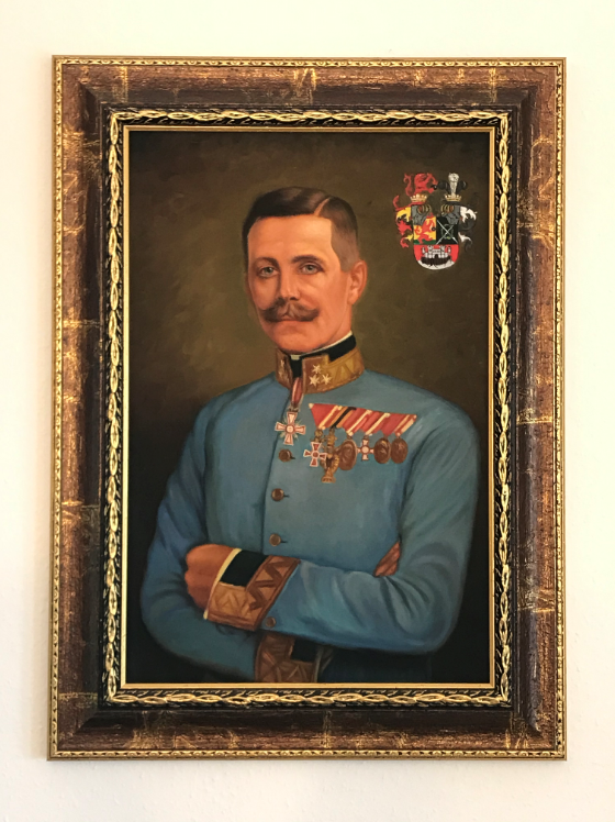 Gemälde von August Ritter Nitsche von Wallwehr als k&k Oberst und Ritter des kaiserlichen Leopold-Ordens.